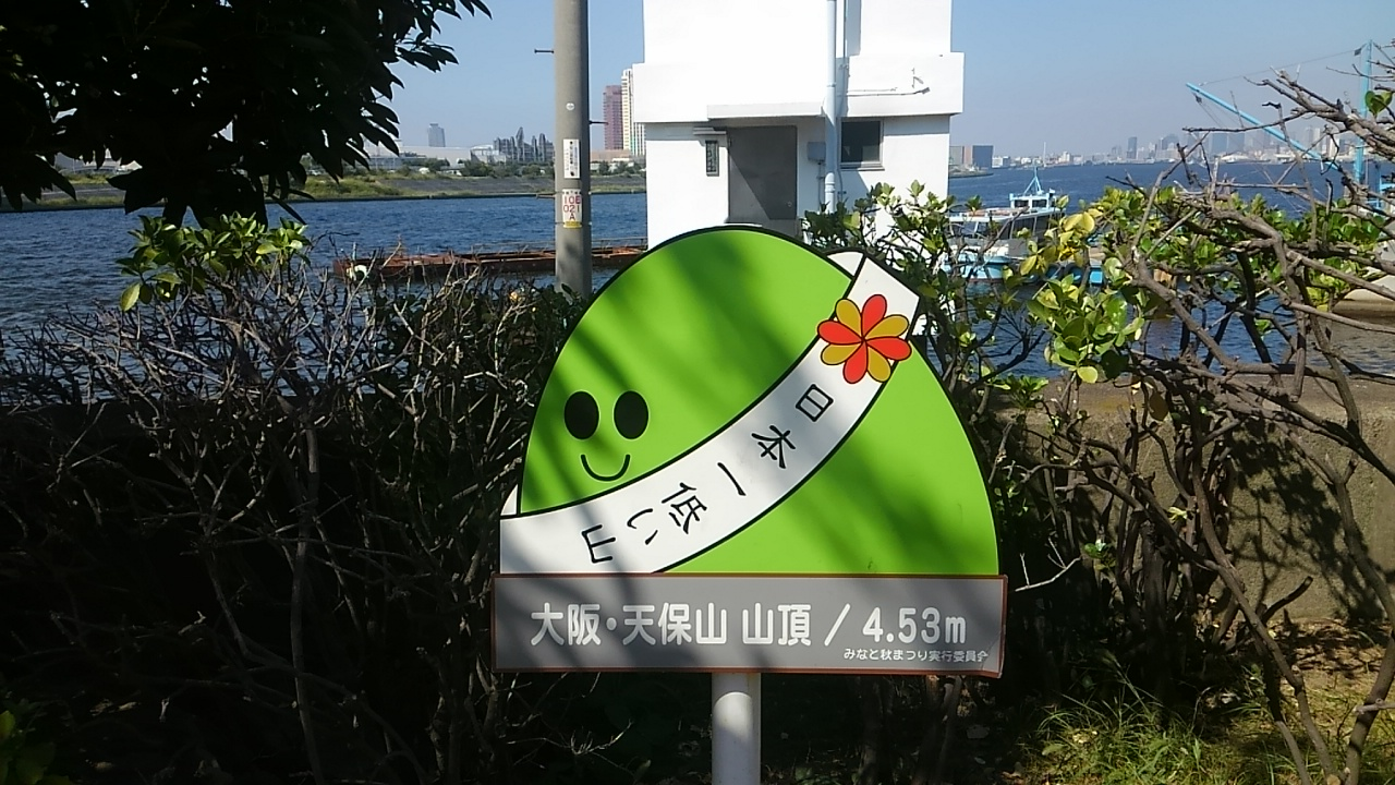 天保山公園看板